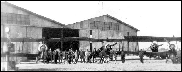 Primeros hangares del Aeródromo de La Torrecica, Albacete.